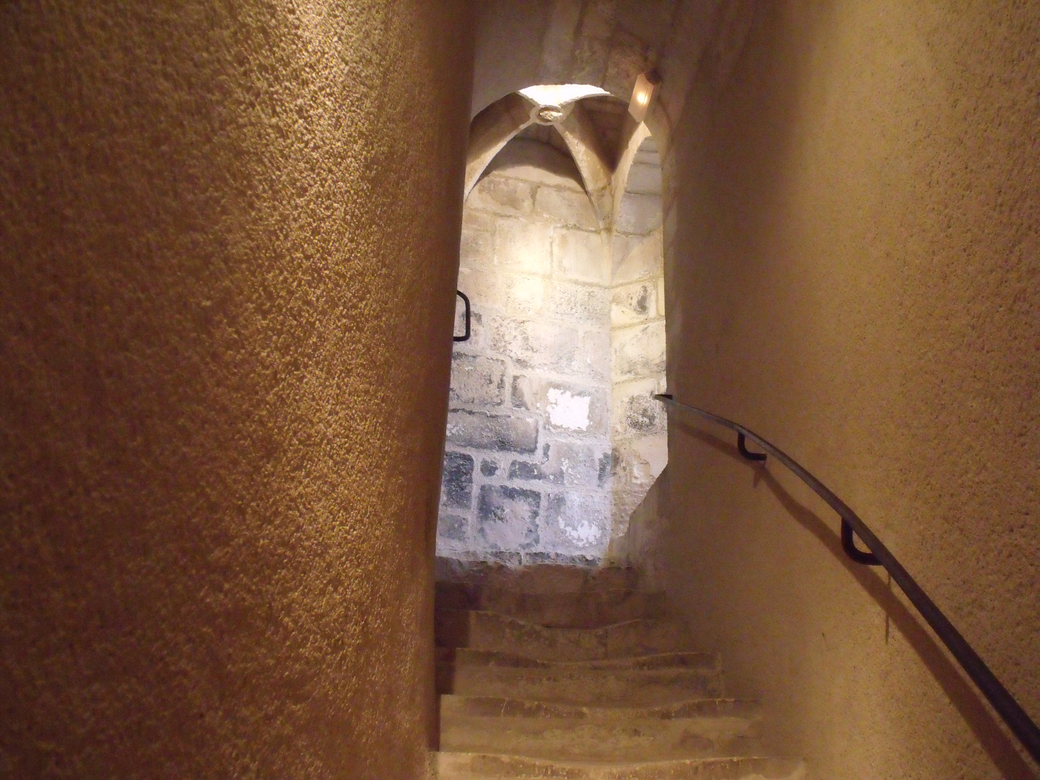 Torre de San Nicolás en La Rochela.